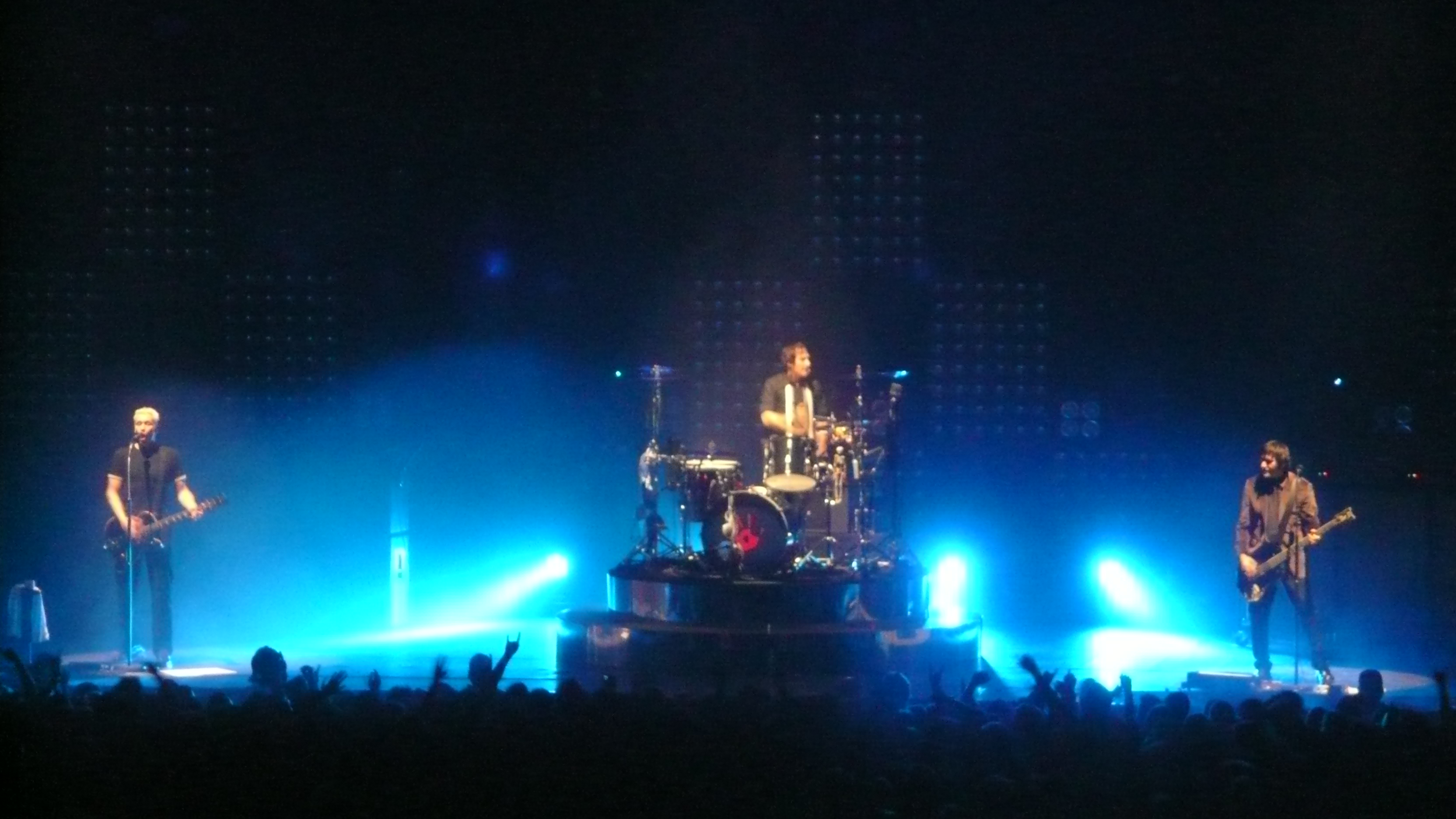 die ärzte